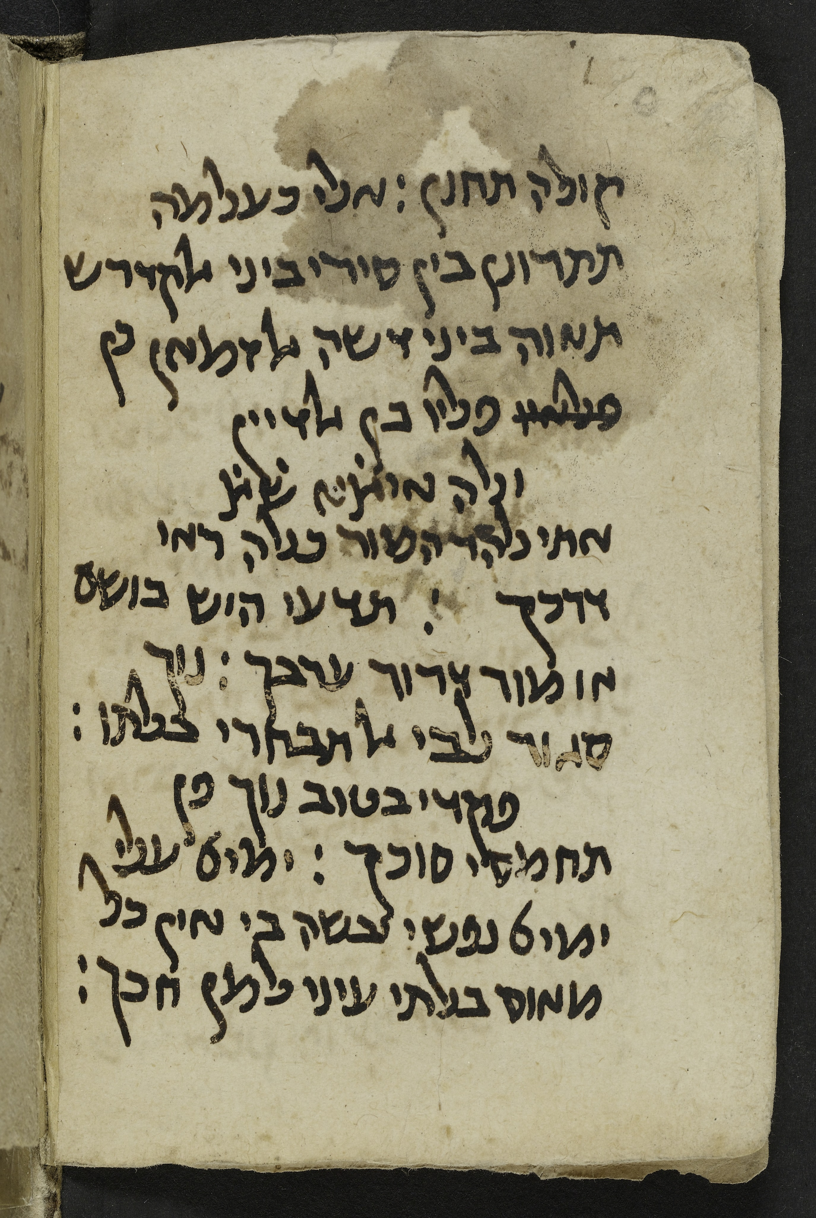 Manuscrito Jarcha hebrea 1